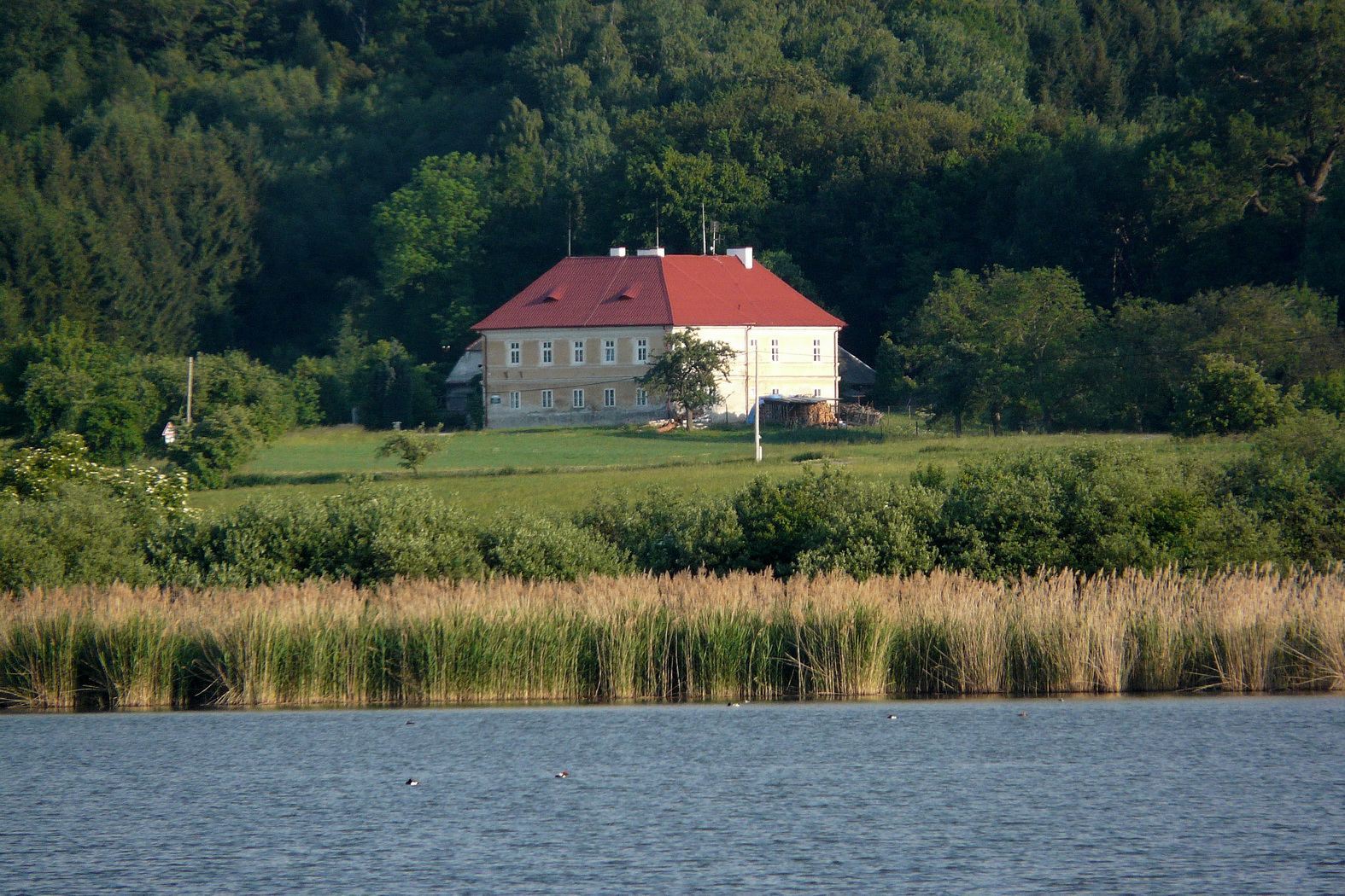 Myslivna Ovčín nad rybníkem Vražda